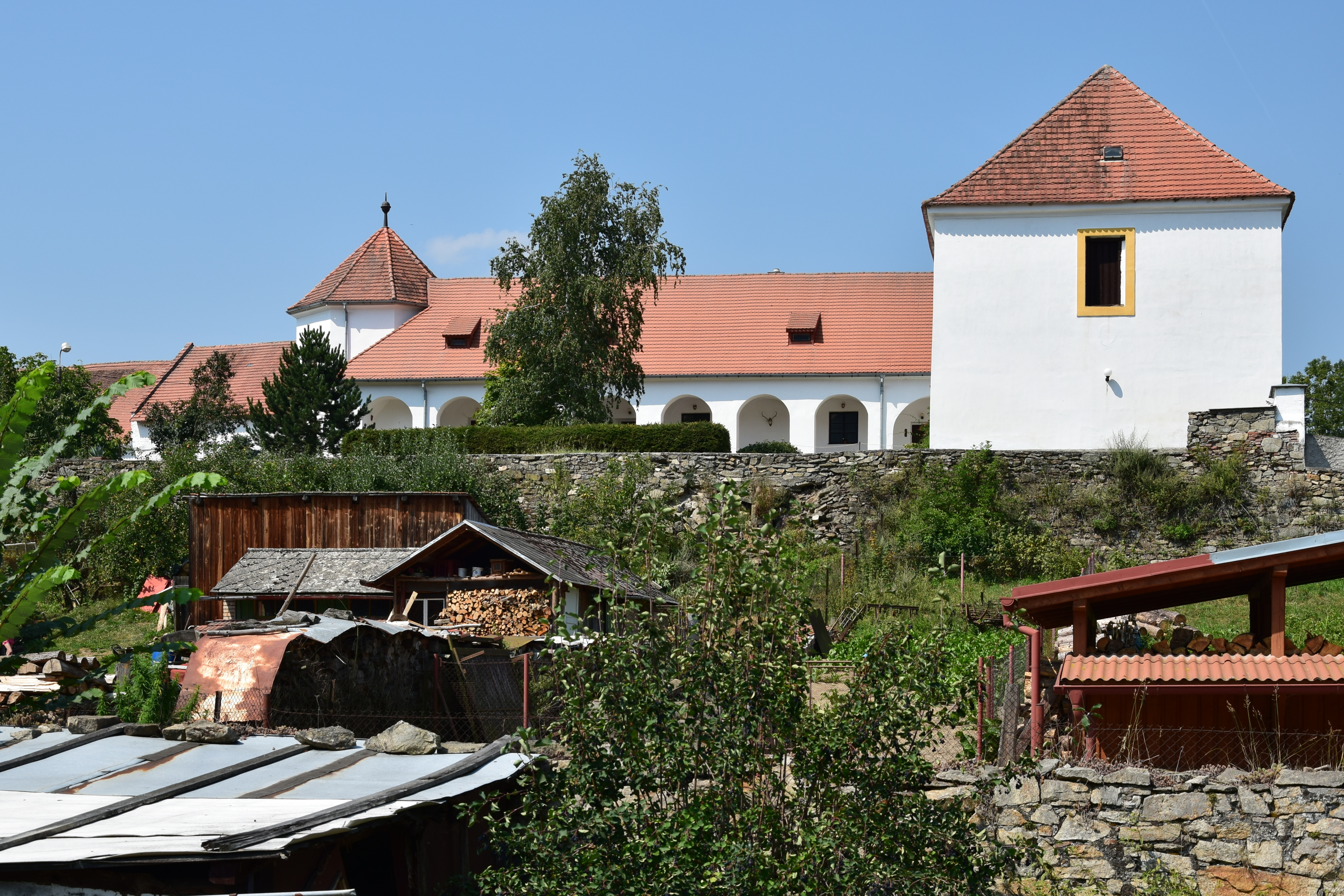 Ujčínský zámek – vpravo budova sýpky, v pozadí zámecká budova s arkádovou chodbou